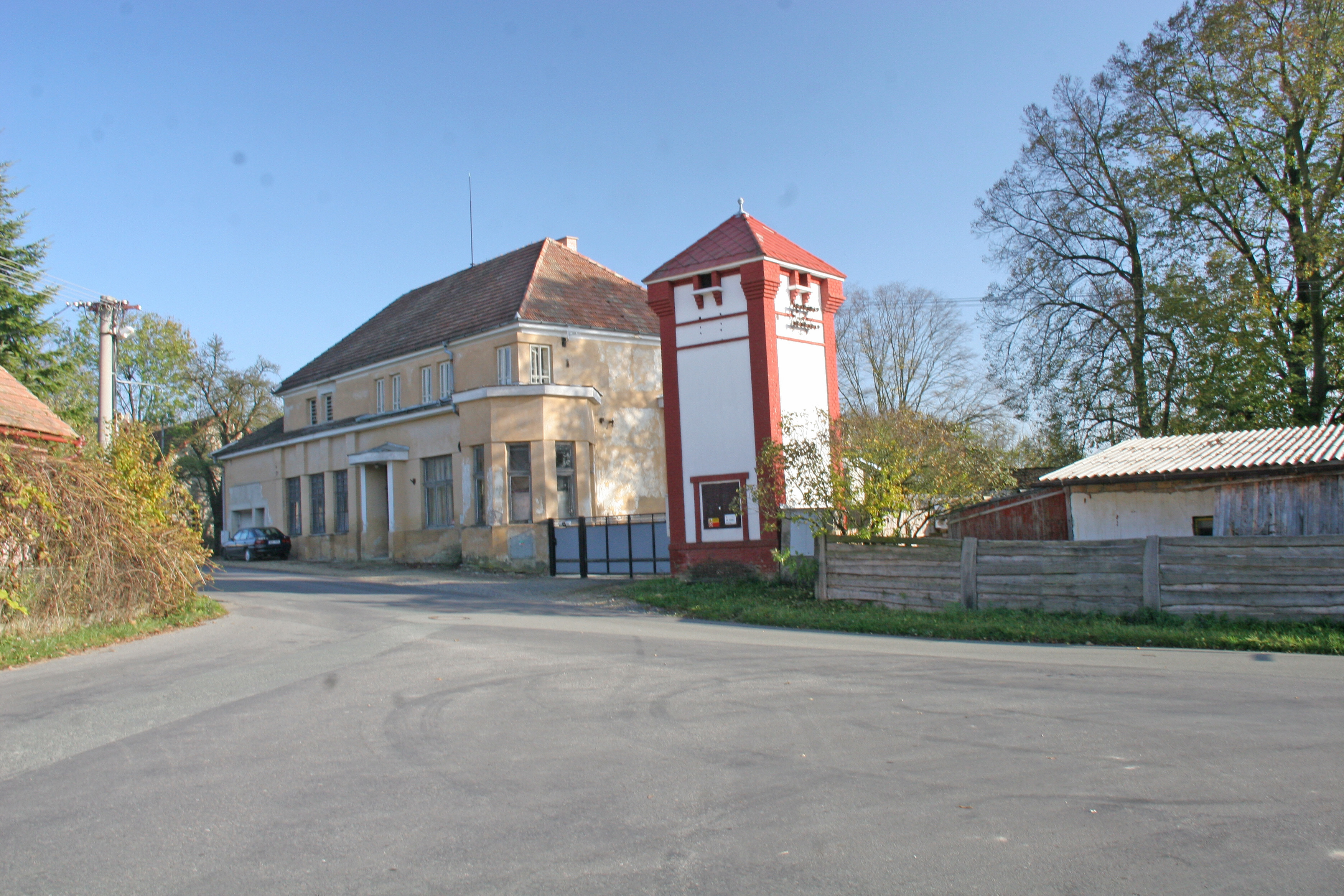 Podlesí čp. 23